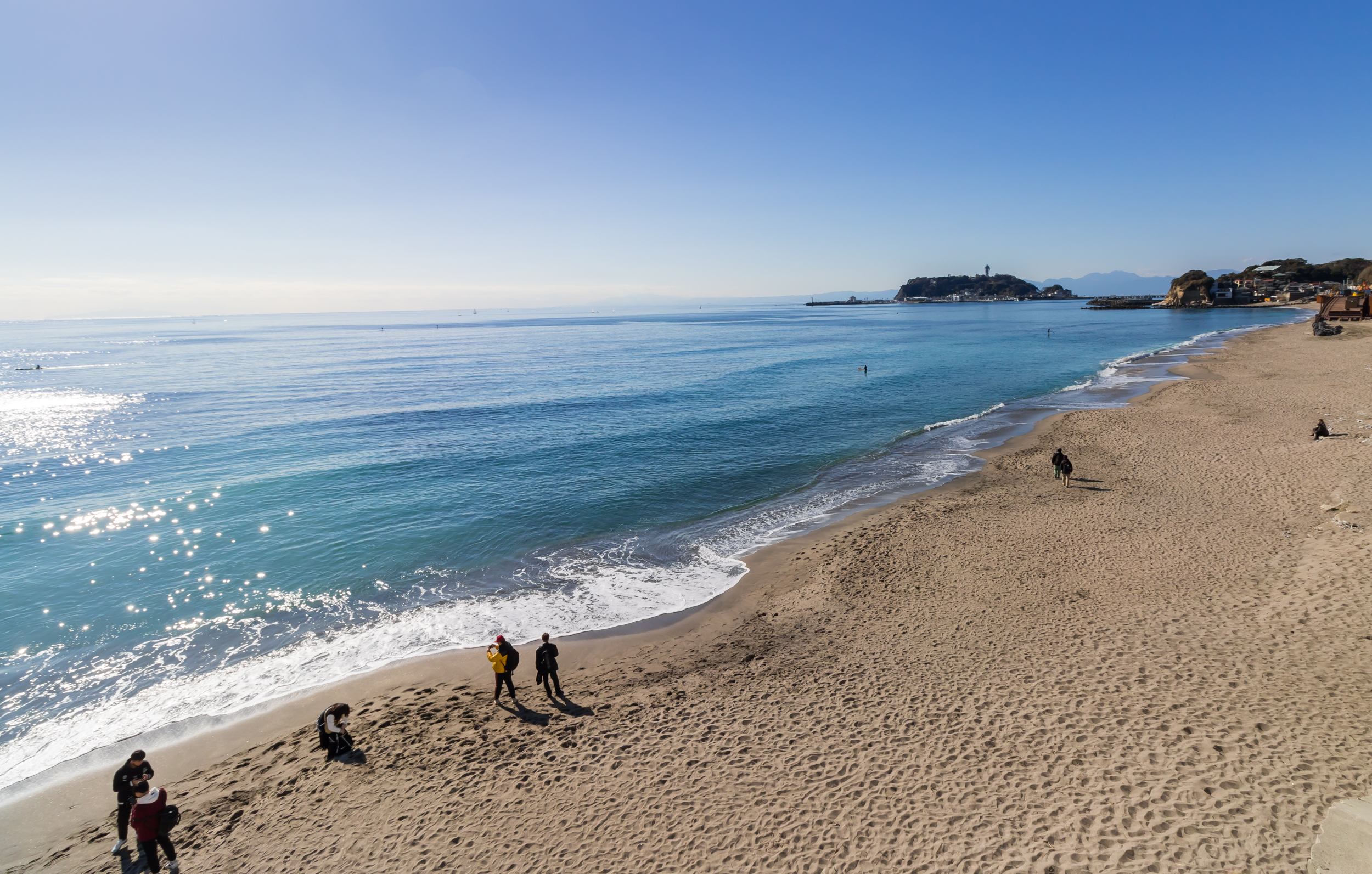 七里ヶ浜より見る江の島(神奈川県鎌倉市)